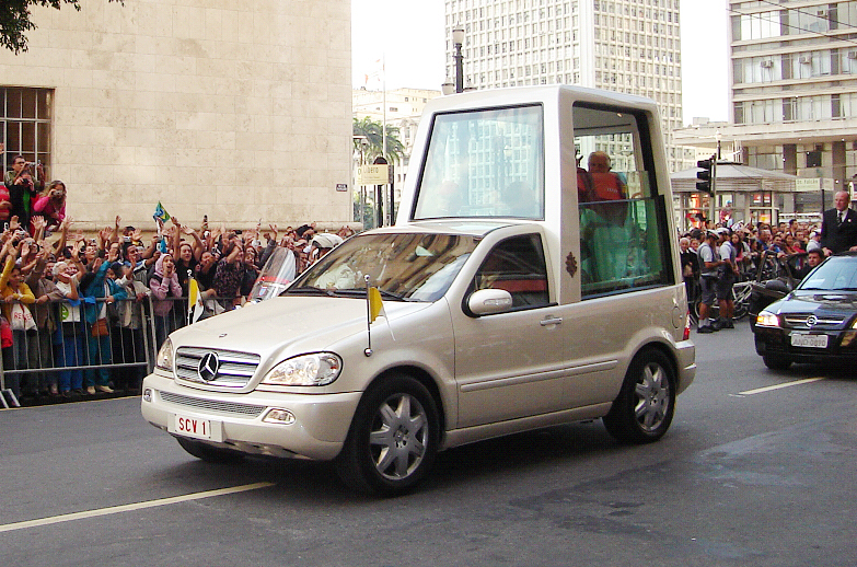 Pope Benedict XVI in São Paulo, Brazil